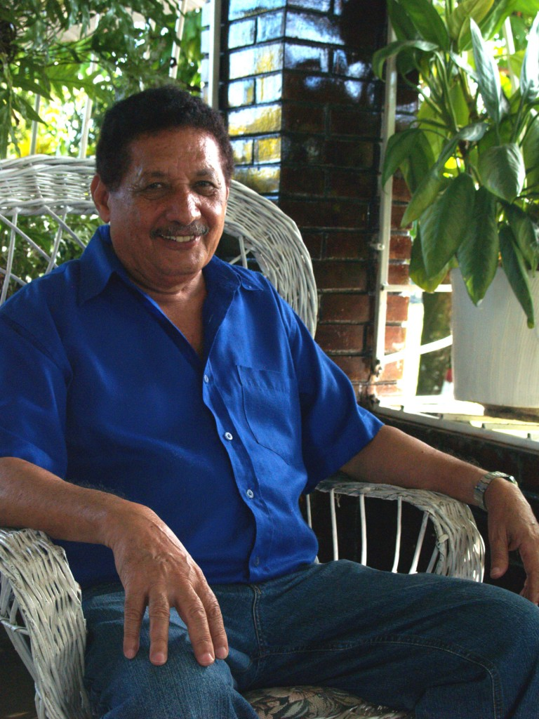 Juvenal Ravelo en Caripito - Edo. Monagas - Venezuela